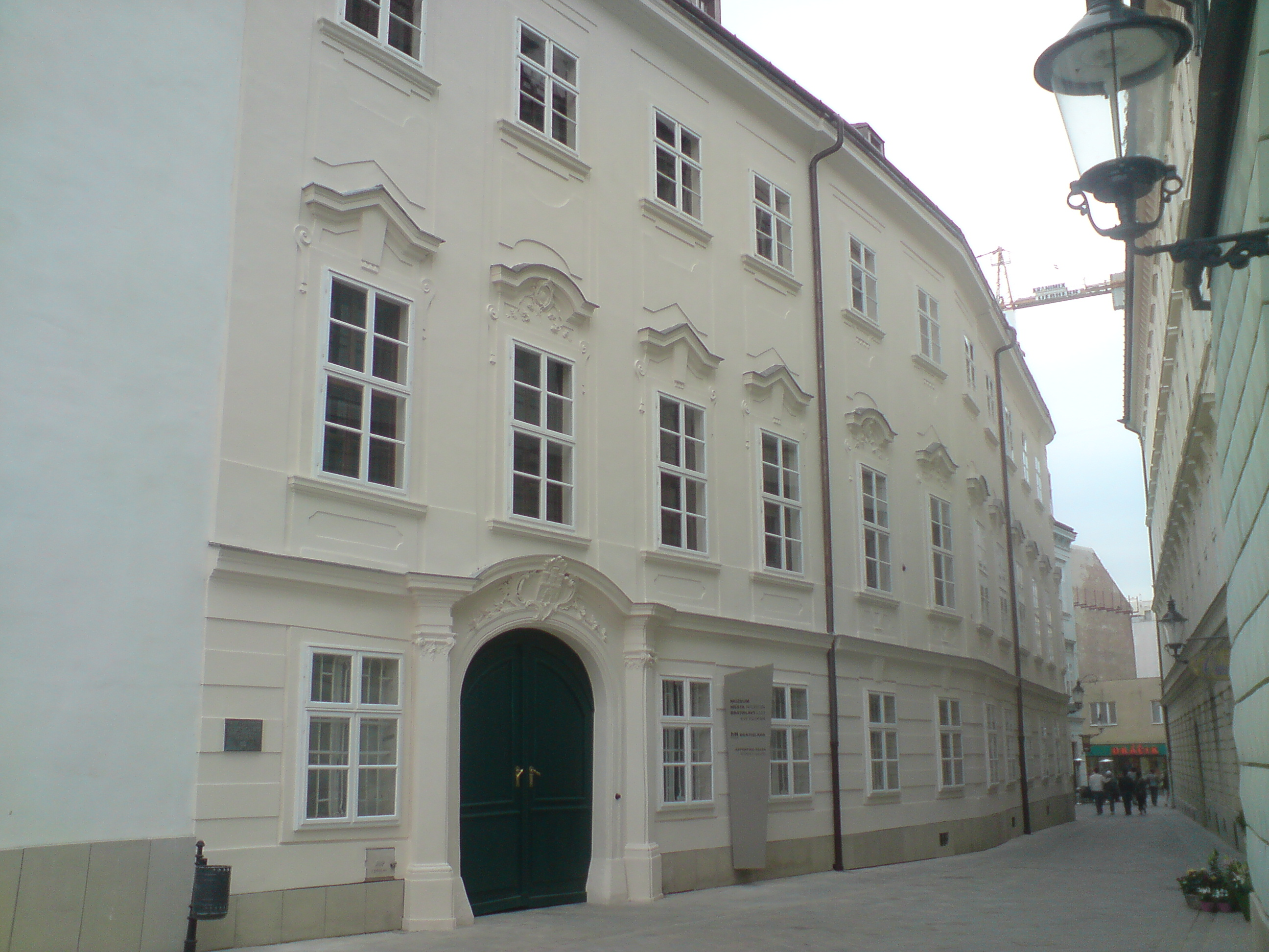 Aponiho palác, Radničná, Bratislava